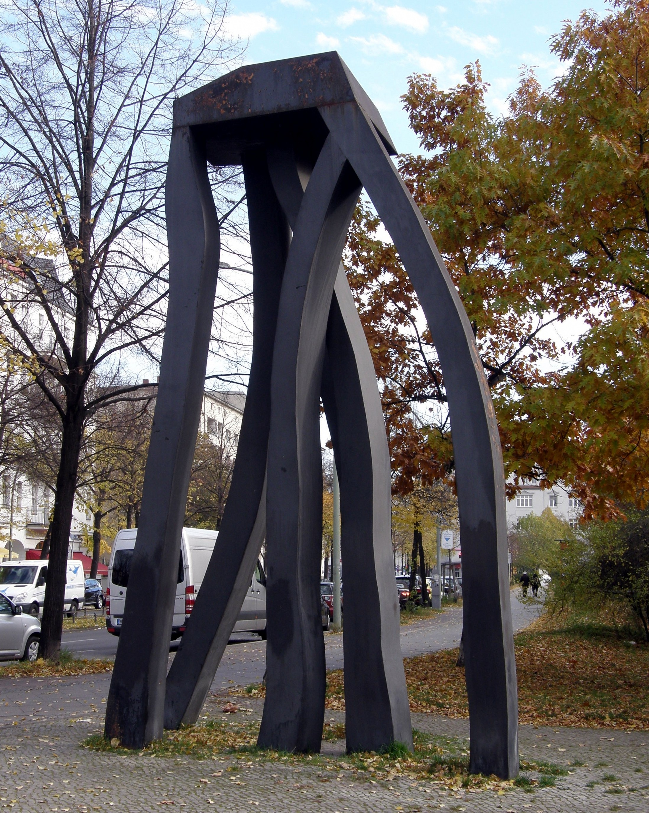 Skulptur "Lenz 92" von Pit Kroke. Standort: Olivaer Platz (Lietzenburger Ecke Konstanzer Straße) in Berlin-Charlottenburg